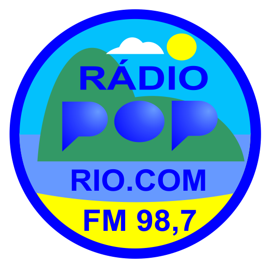 Logomarca da Rádio Pop Rio